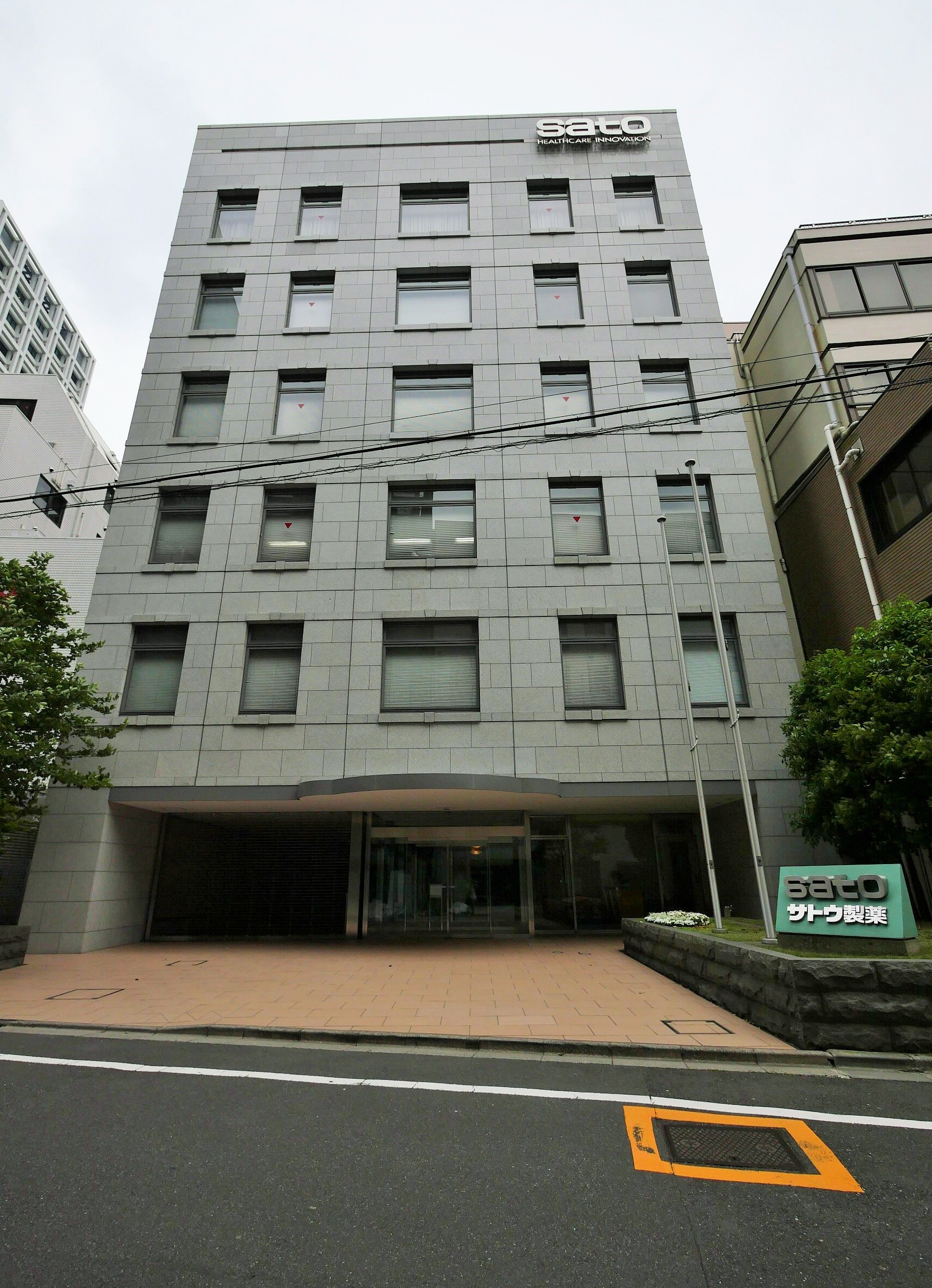 佐藤製薬の本社ビル